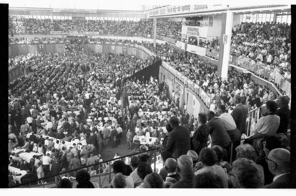 in der Ostseehalle.